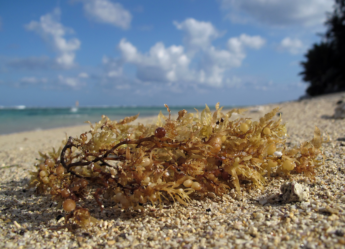 Une sargasse (Sargassum sp.) échouée sur la plage de l'Ermitage, à la Réunion.